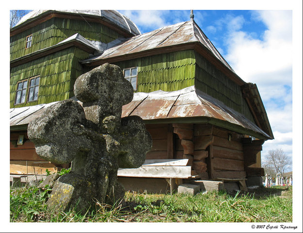 Церква святих верховних апостолів Петра і Павла в Урмані Бережанського району Тернопільської області.